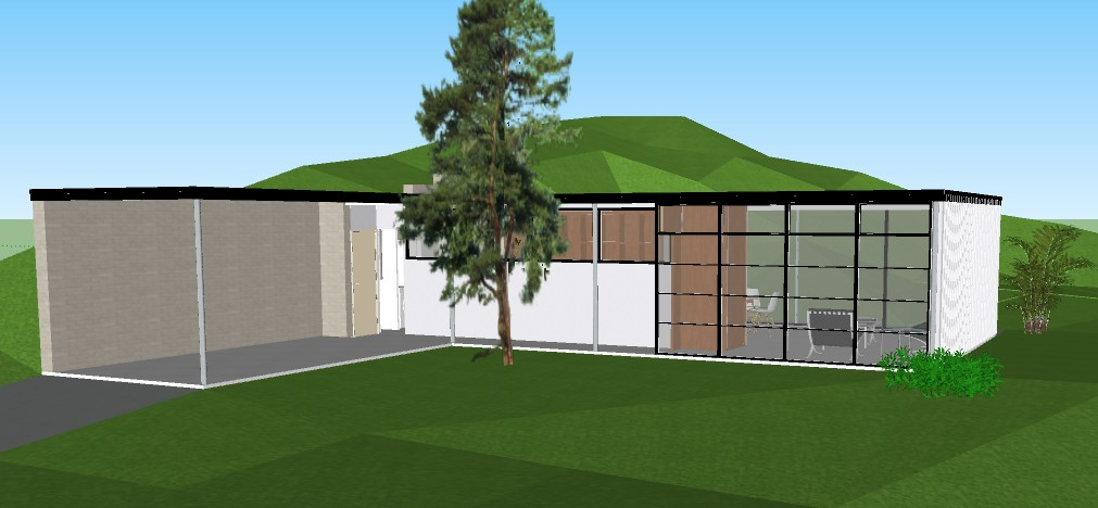 Modélisation de la maison